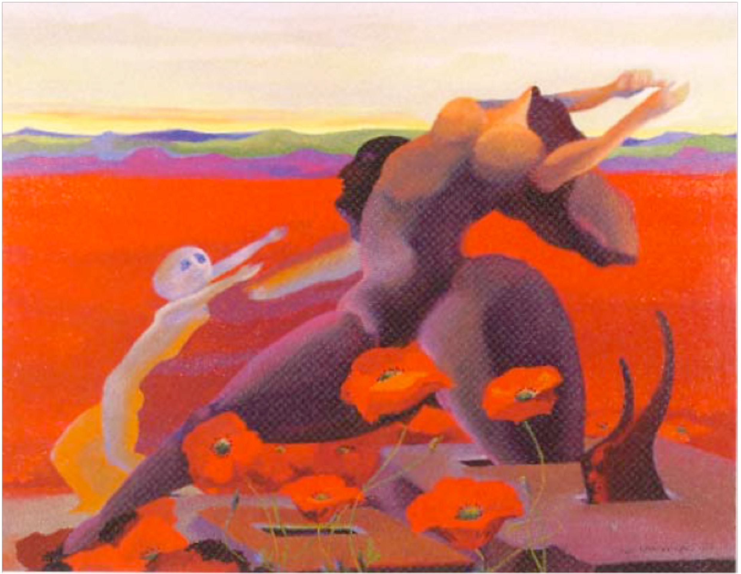 Oli Sublimacions